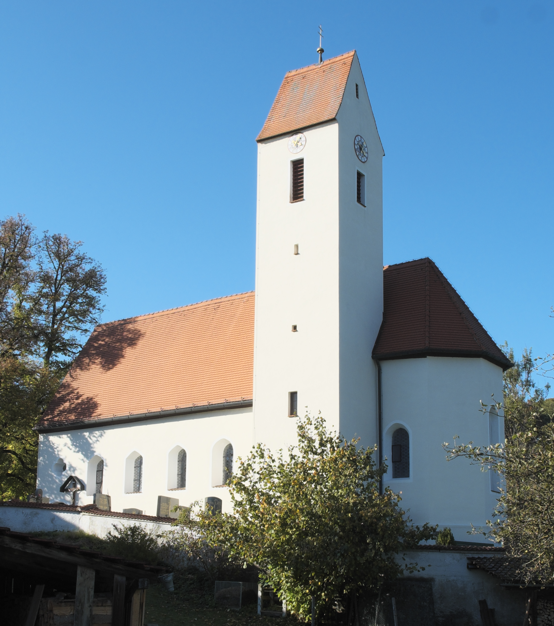 Katholische Filialkirche St. Martin in Zell (Großweil) im Landkreis Garmisch-Partenkirchen (Bayern/Deutschland)